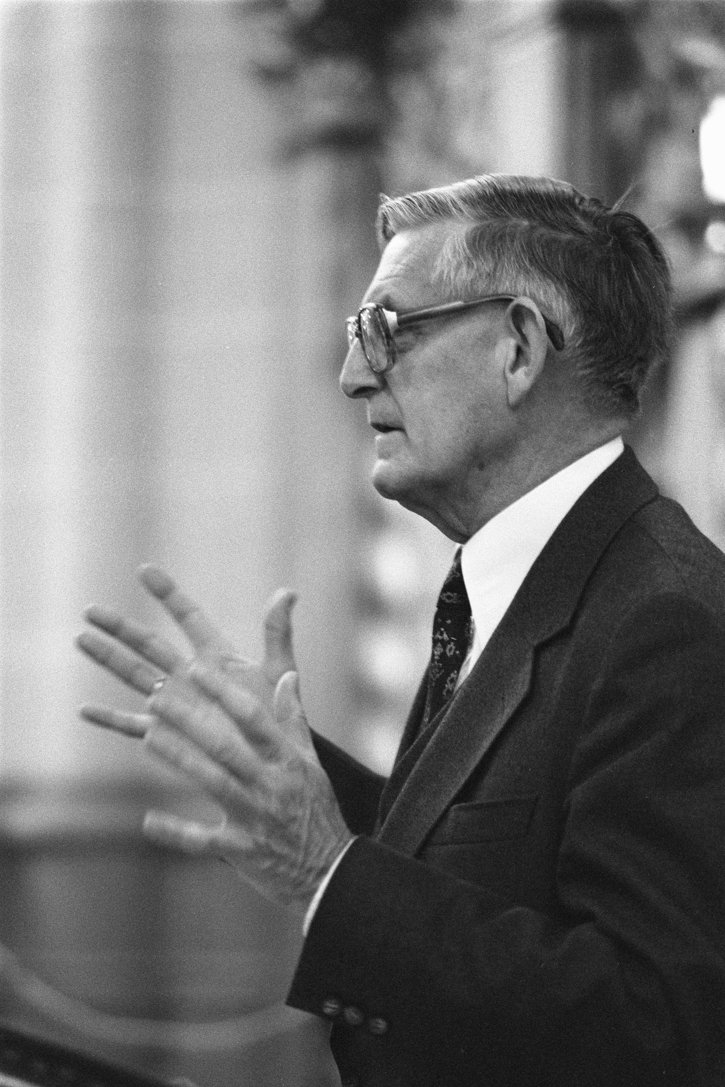 Collectie / Archief : Fotocollectie Anefo Reportage / Serie : [ onbekend ] Beschrijving : Raad van Kerken Landelijke kerkenconferentie in Nieuwe Kerk te A'dam, Berkhof tijdens zijn toespraak in Nieuwe Kerk te A'dam Datum : 29 november 1980 Locatie : Amsterdam, Noord-Holland Trefwoorden : Kerken, conferenties, toespraken Instellingsnaam : Raad van Kerken in Nederland Fotograaf : Antonisse, Marcel / Anefo Auteursrechthebbende : Nationaal Archief Materiaalsoort : Negatief (zwart/wit) Nummer archiefinventaris : bekijk toegang 2.24.01.05 Bestanddeelnummer : 931-1791